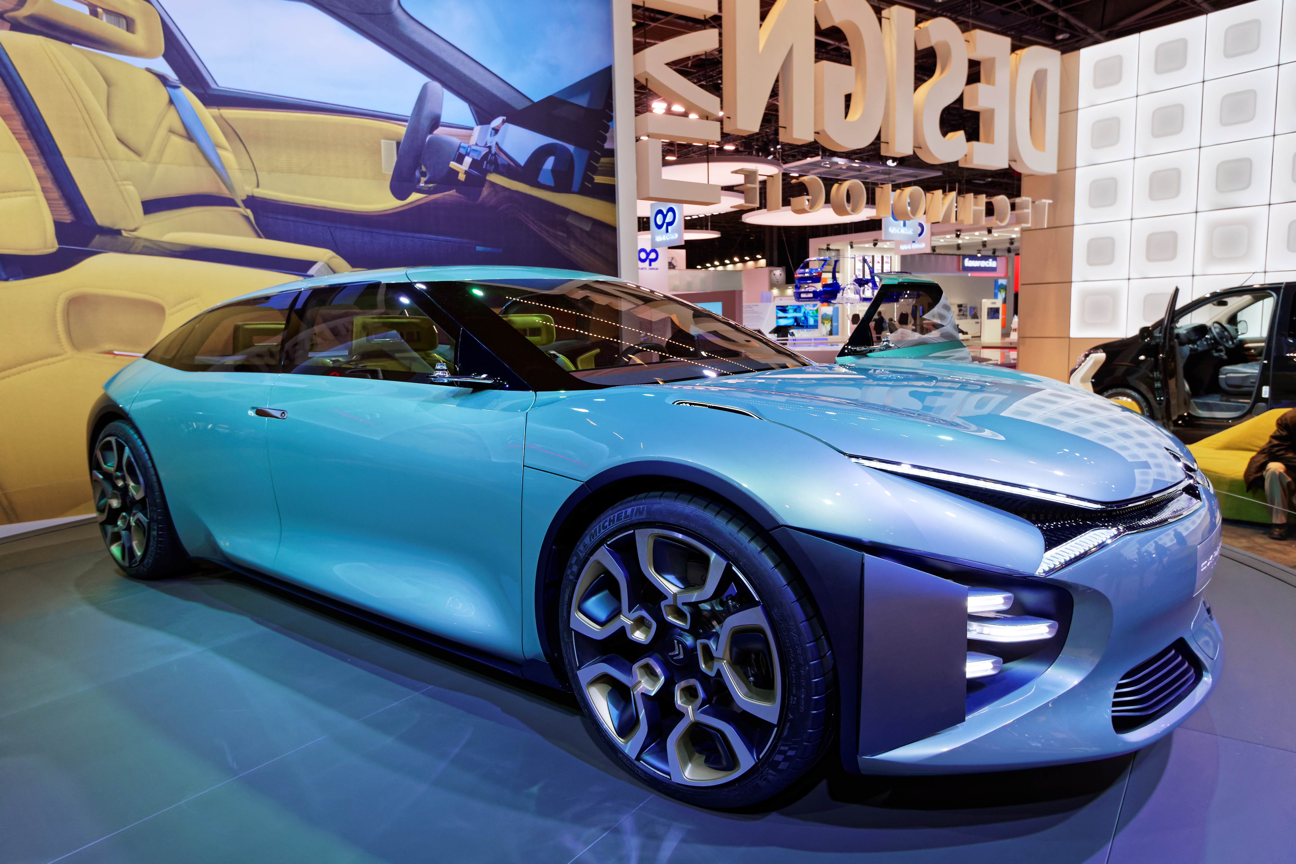 Une Citroën CXperience Concept présentée lors du mondial de l'automobile de Paris 2016.